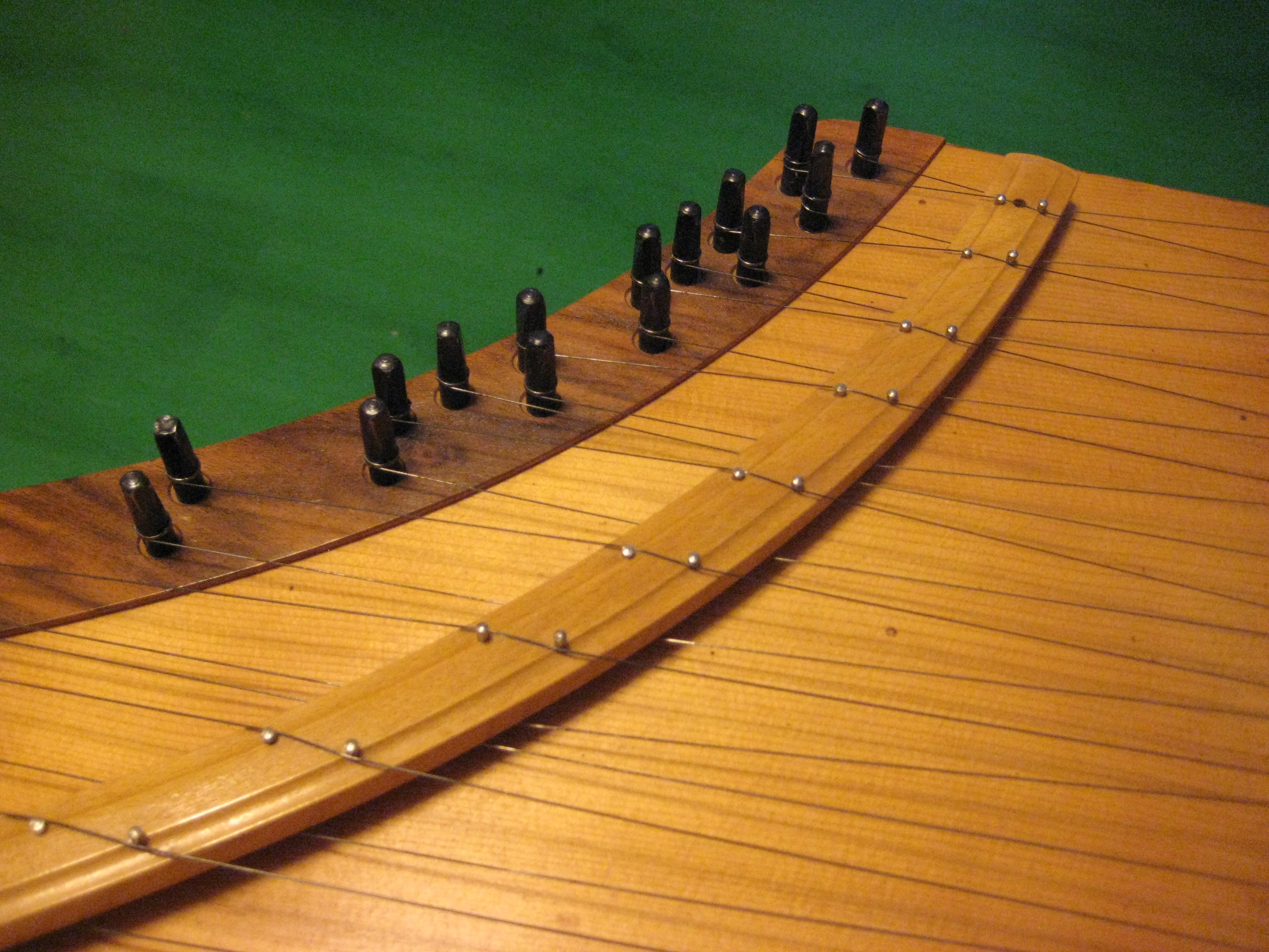 Kromaatilise kandle roop